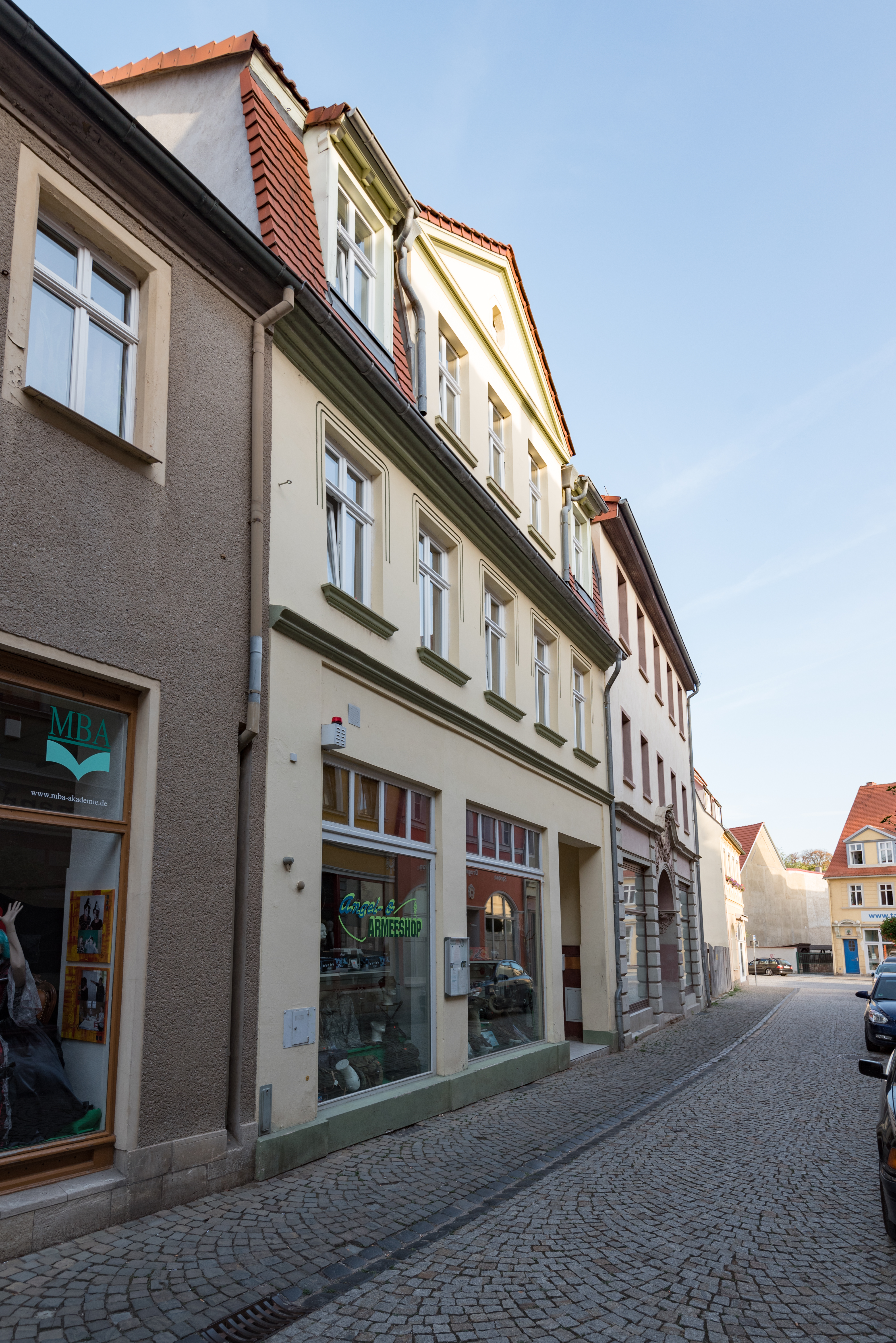 Naumburg (Saale), Wenzelsstraße 37